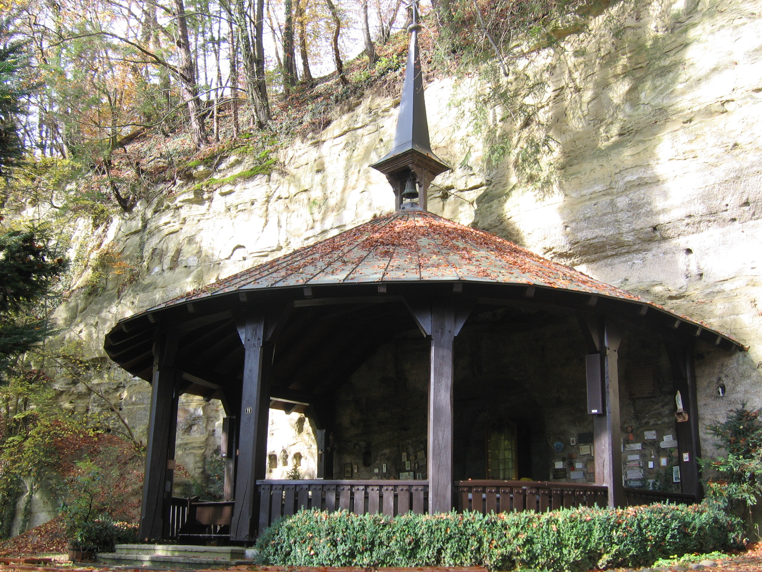 Deutschland - Baden-Württemberg - Bodenseekreis - Überlingen: Maria im Stein; große Kapelle